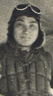 高橋赫一海軍大尉。上海・公大基地にて。昭和12年9月18日～11月30日頃。 Lieutenant Kakuichi Takahashi of the Imperial Japanese Navy. At Gongda Airbase, Shanghai, 1937.